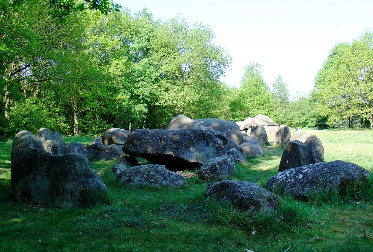 Hunebed D20 nabij Drouwen